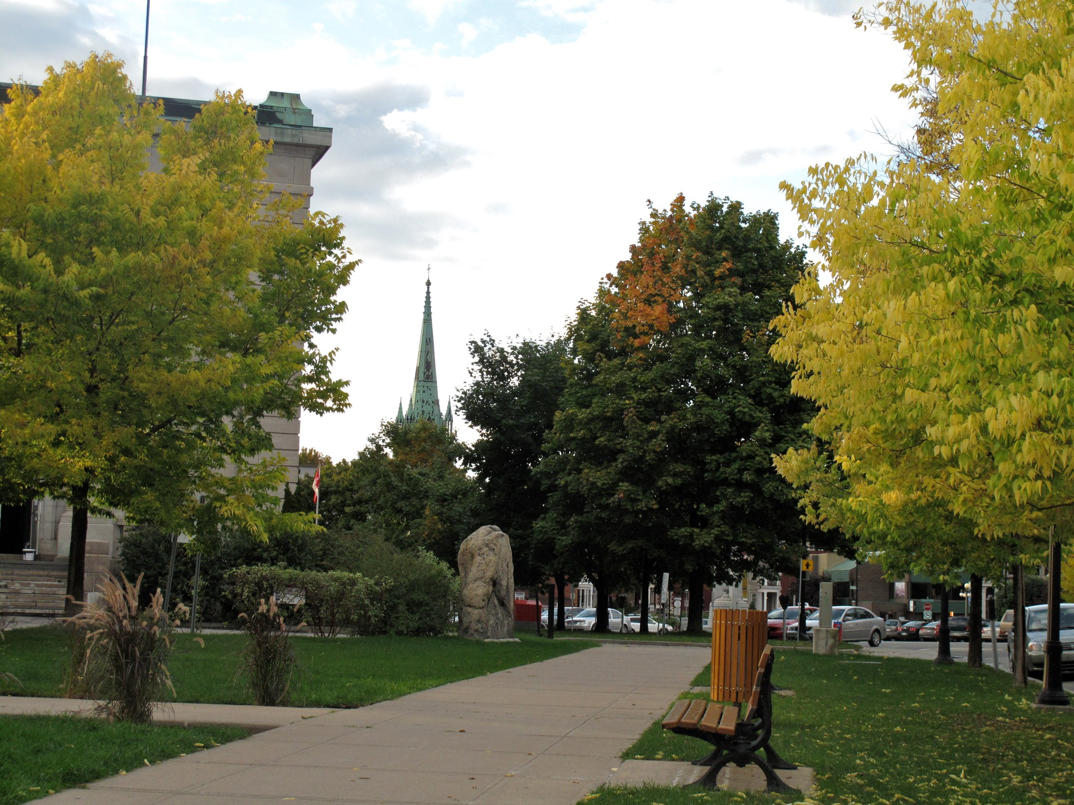 Trois-Rivières 115